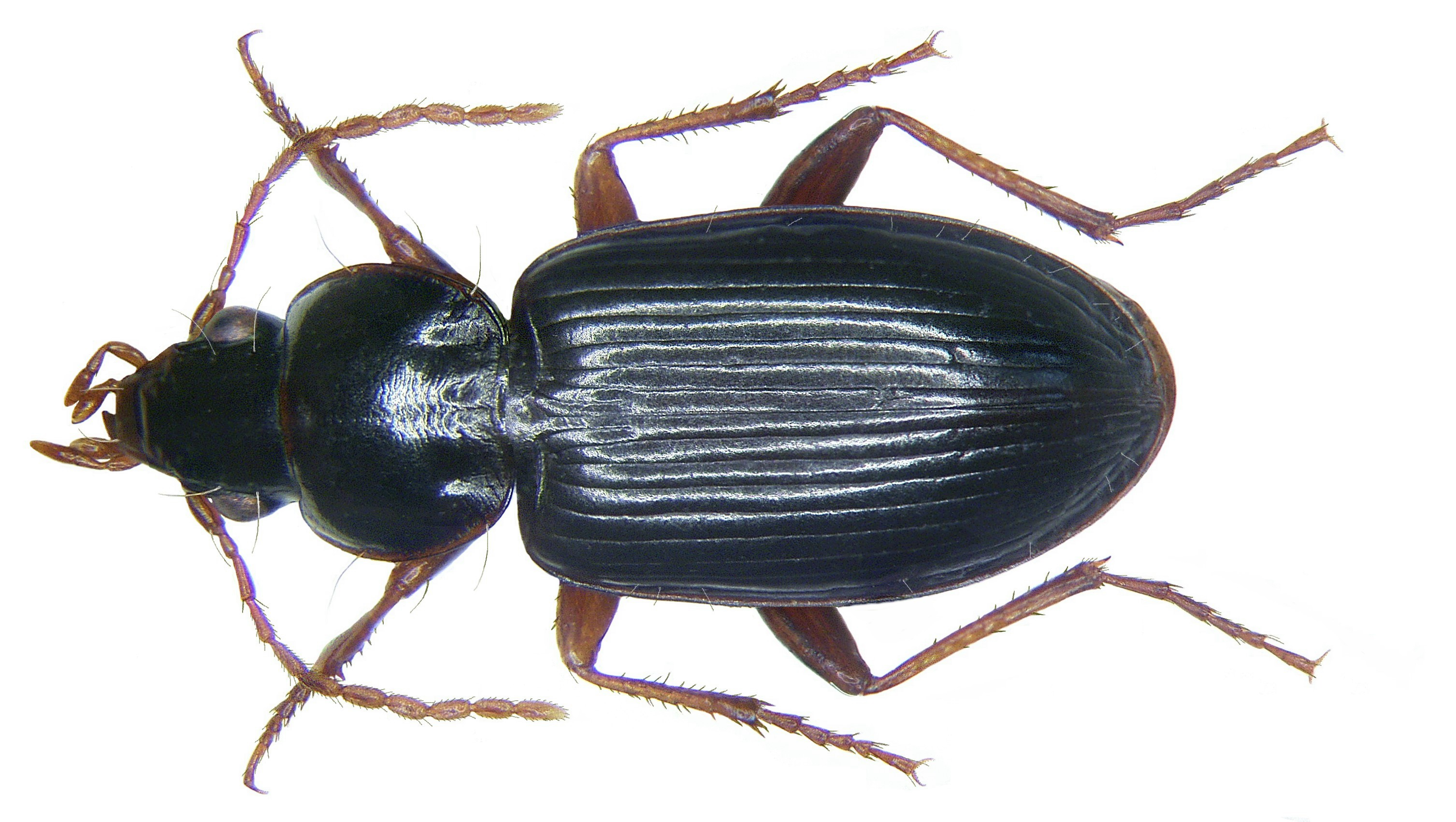 Familie: Carabidae Größe: 5,8-9 mm Verbreitung: palaearktisch Ökologie: vor allem in offenen Lebensräumen Fundort: Germania, Bayern, Oberfranken, Selbitz leg.det. U.Schmidt, 1973 Foto: U.Schmidt, 2008